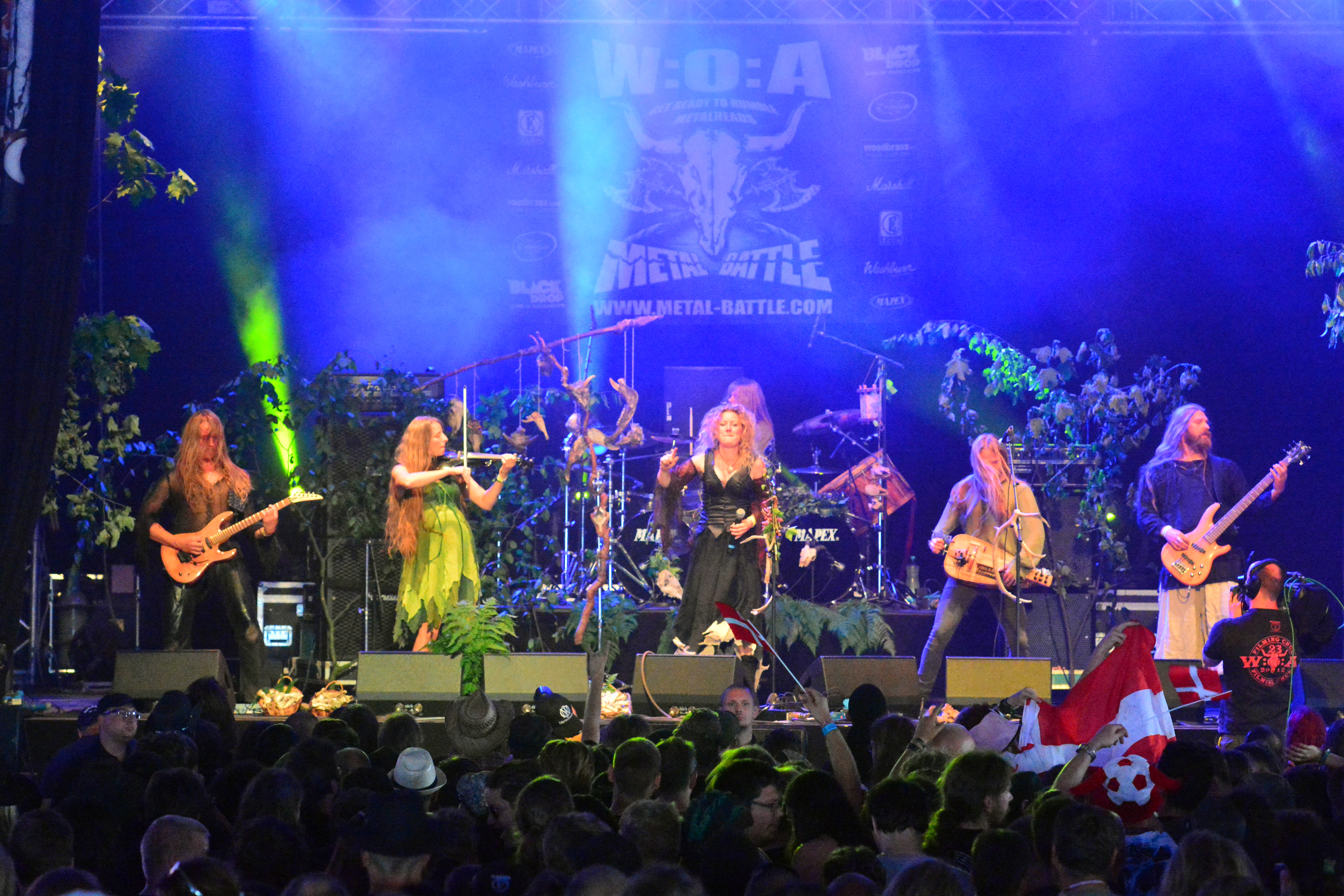 Huldre beim Wacken Open Air 2014